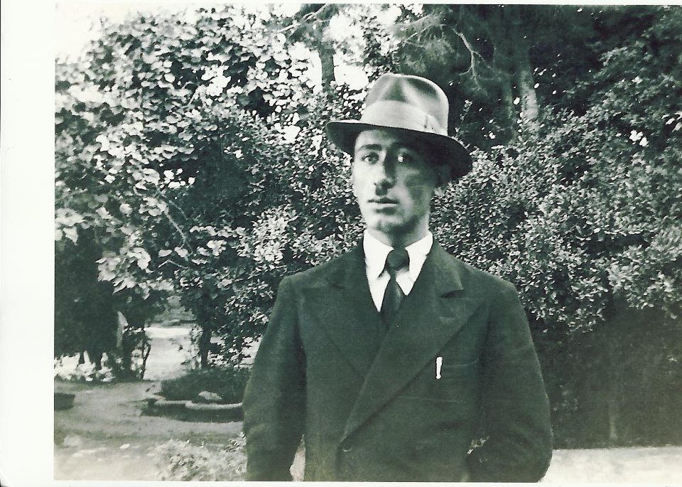 محمد خان یافت آبادی فرزند ارشد مرتضی خان زند